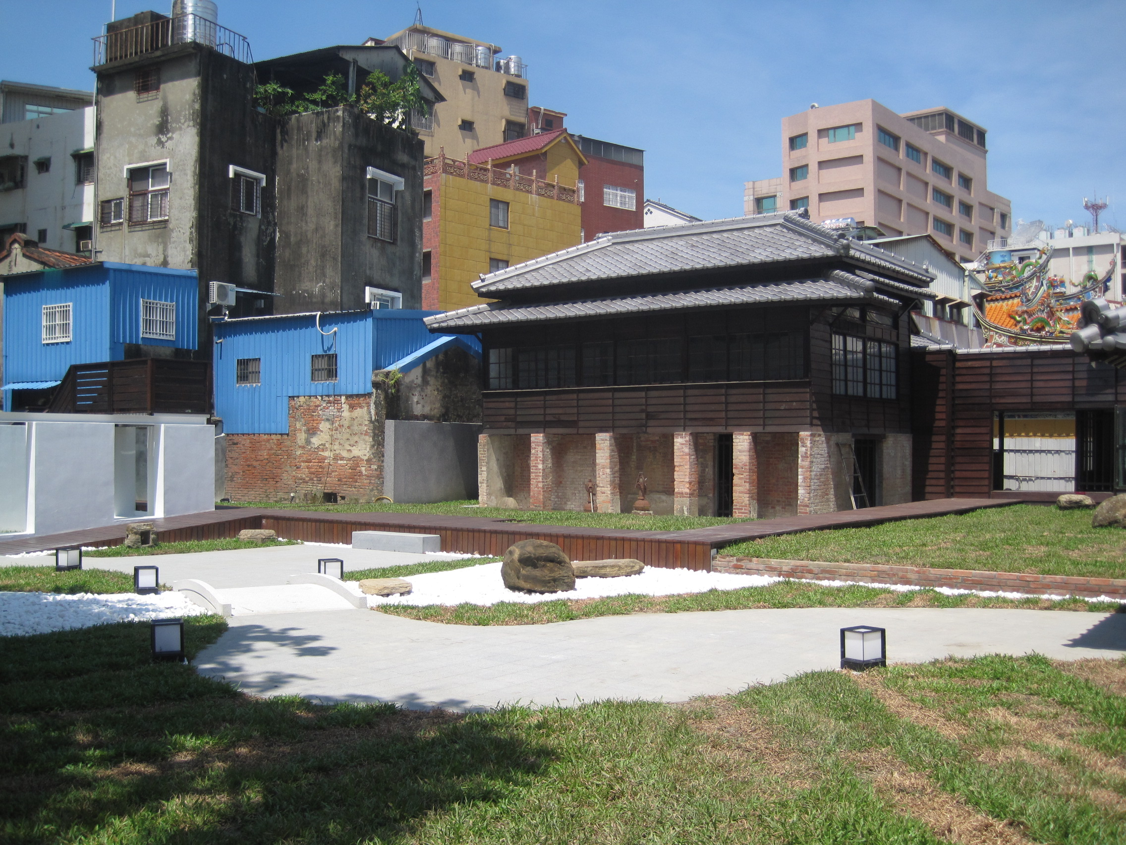 2013年7月拍的鶯料理